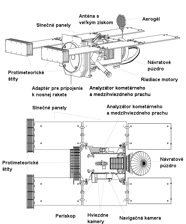 Nákres sondy Stardust